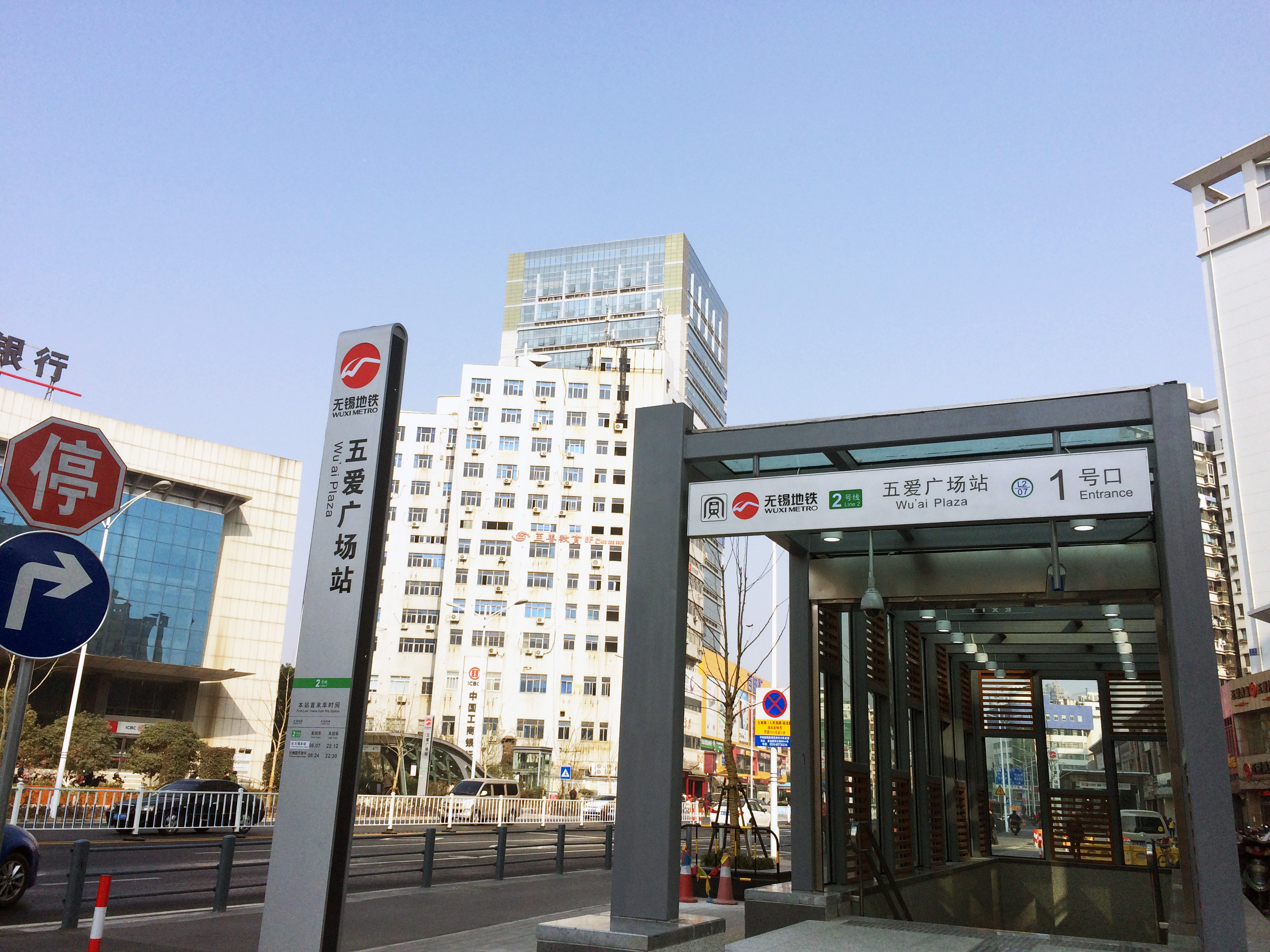 无锡地铁2号线五爱广场站1号口